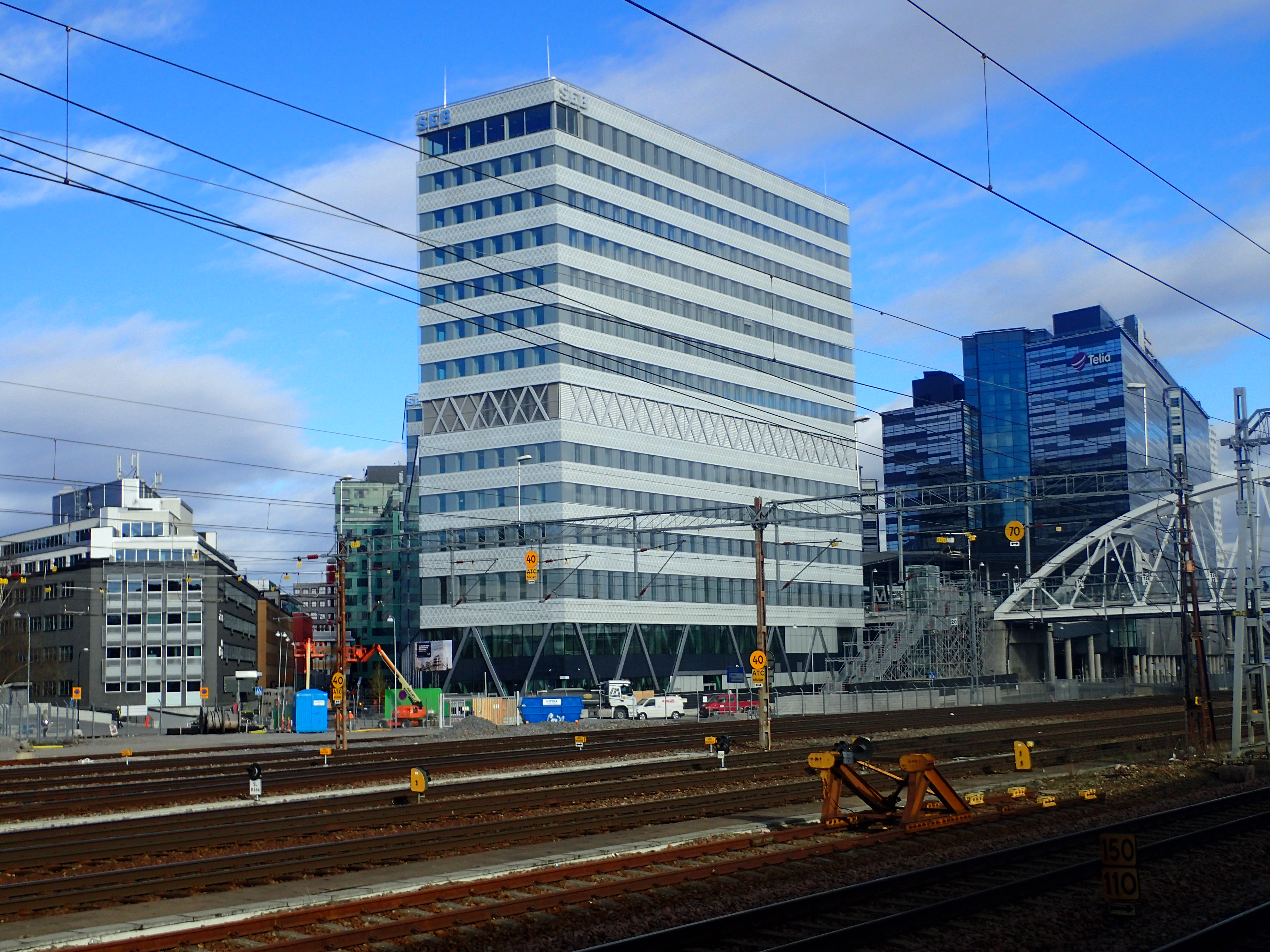 Pyramiden 4. SEB Arenastaden, Solna. Byggnadsår 2014-2017. Arkitekter Alessandro Ripellino Arkitekter AB / Arkitekterna Krook & Tjäder AB.